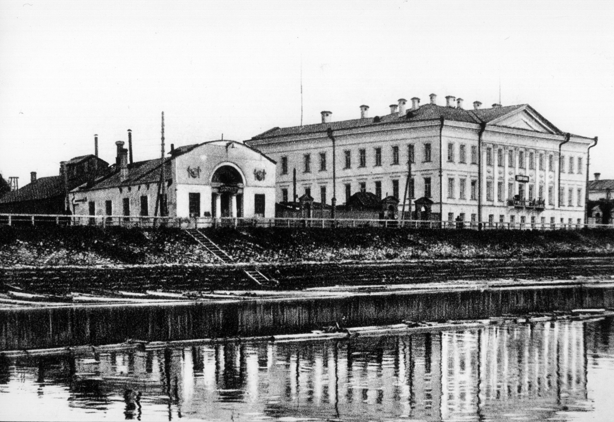 Дом Витушечникова с флигелем в 1910-1930 х годах.